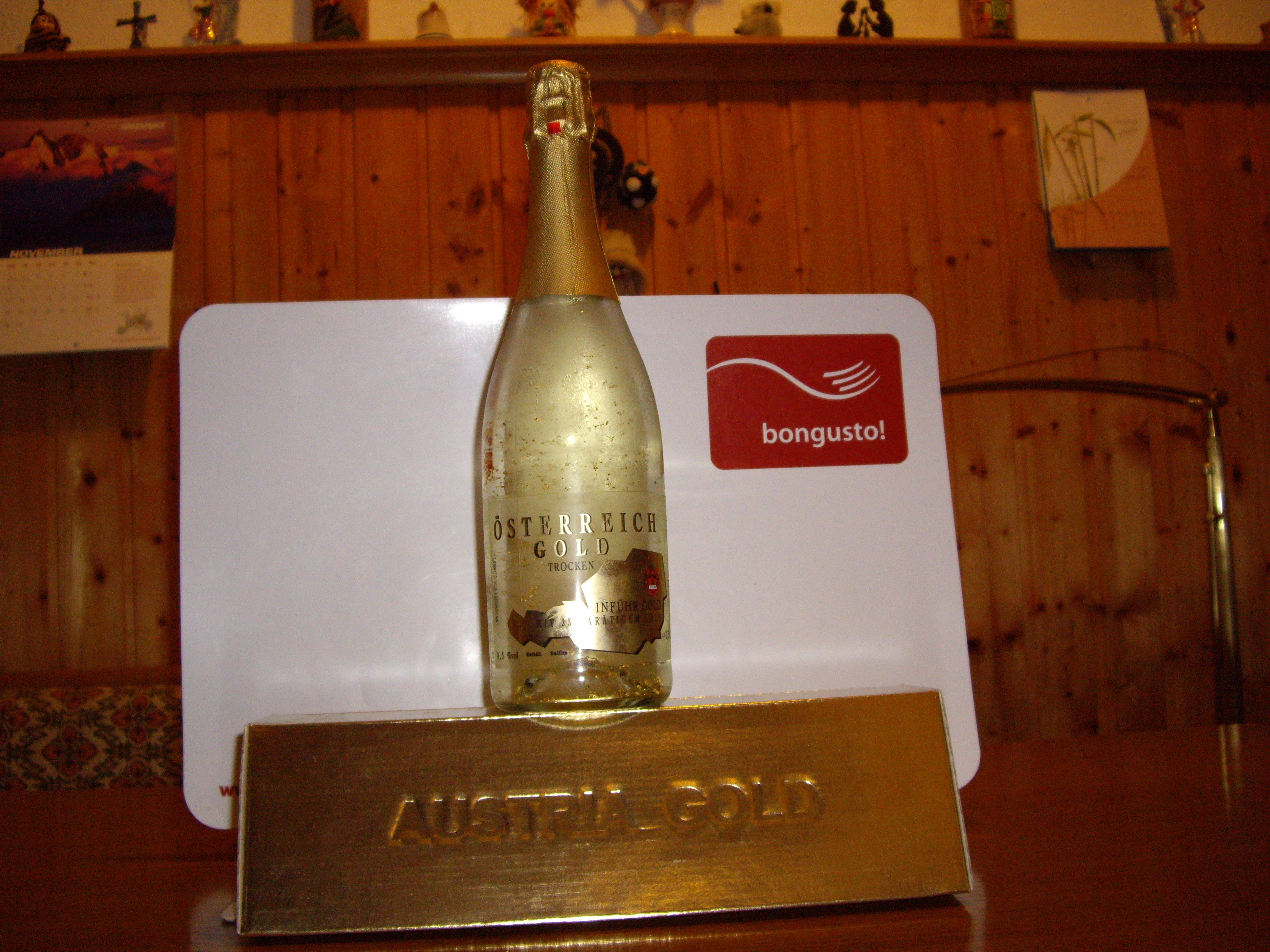 Botelo da ŝaŭmvino kun orfolieroj sur pakumo kiel orbriko.